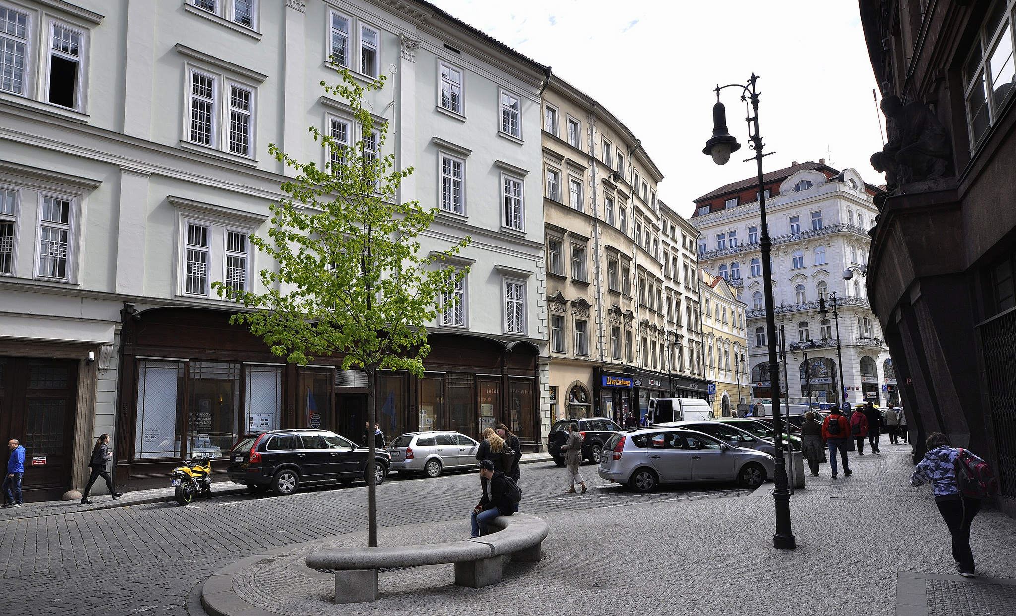 Průhled na domy or. č. 12 až 4; mezi nimi v pozadí ústí Martinská ulice.